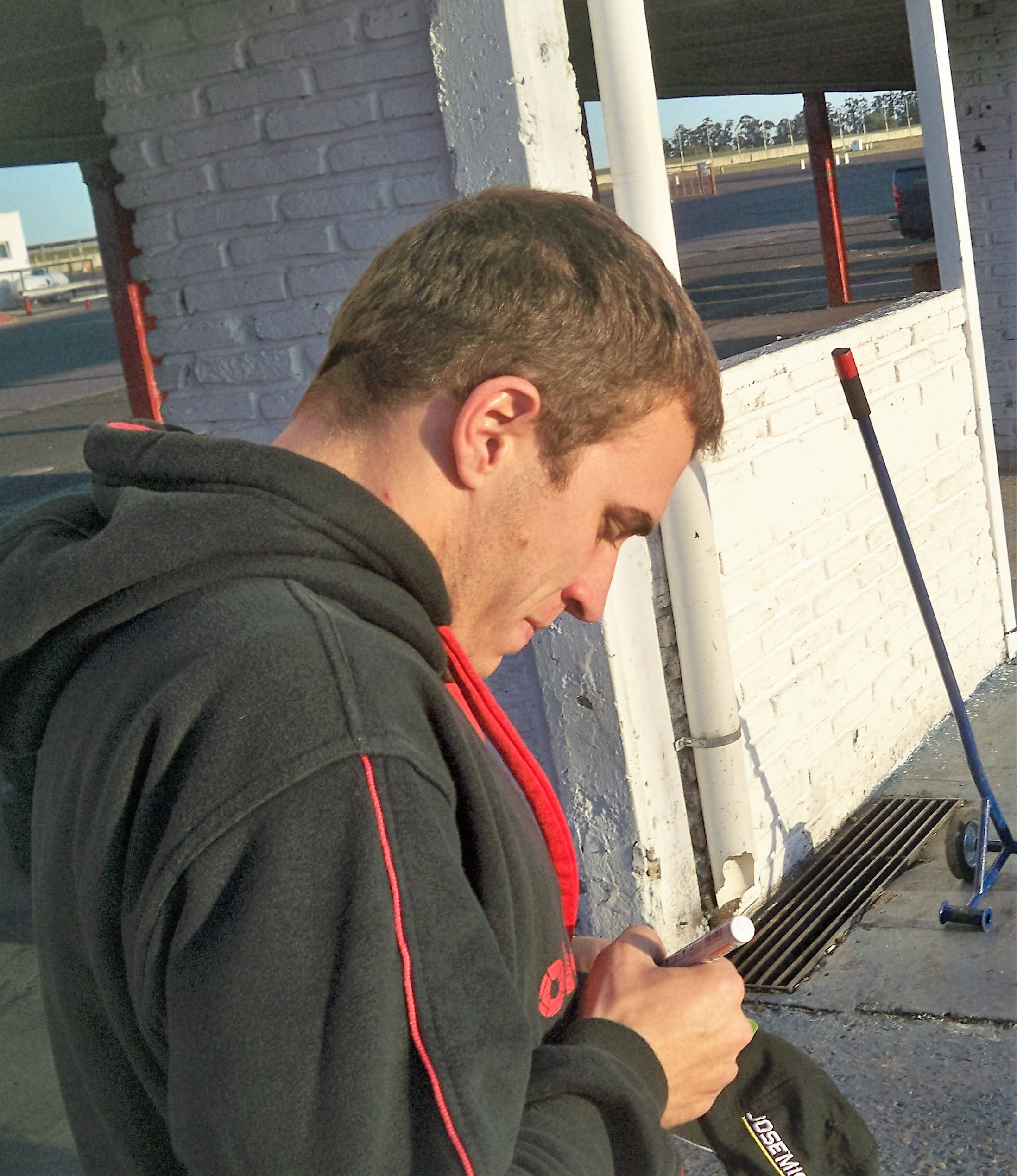 Mariano Werner Autódromo de Paraná 2011